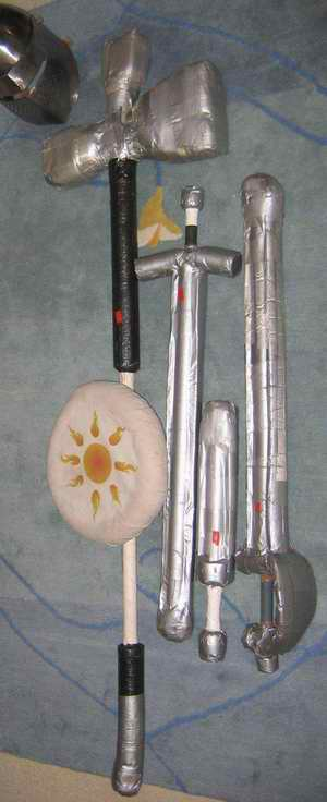 boffer weapons sword buckler halberd dagger